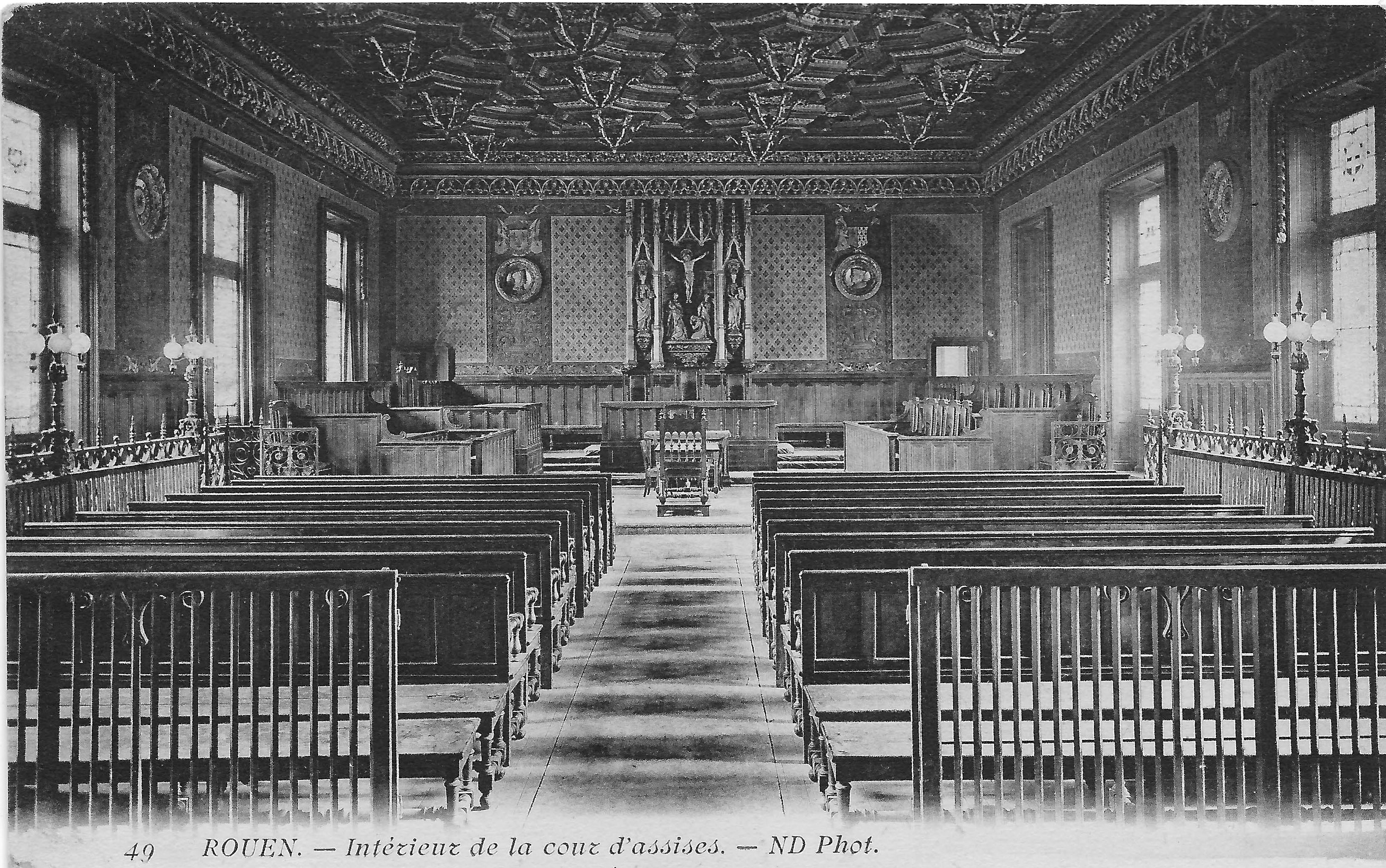 Briefkaart van het gerechtszaal oude gerechtszaal in Rouen